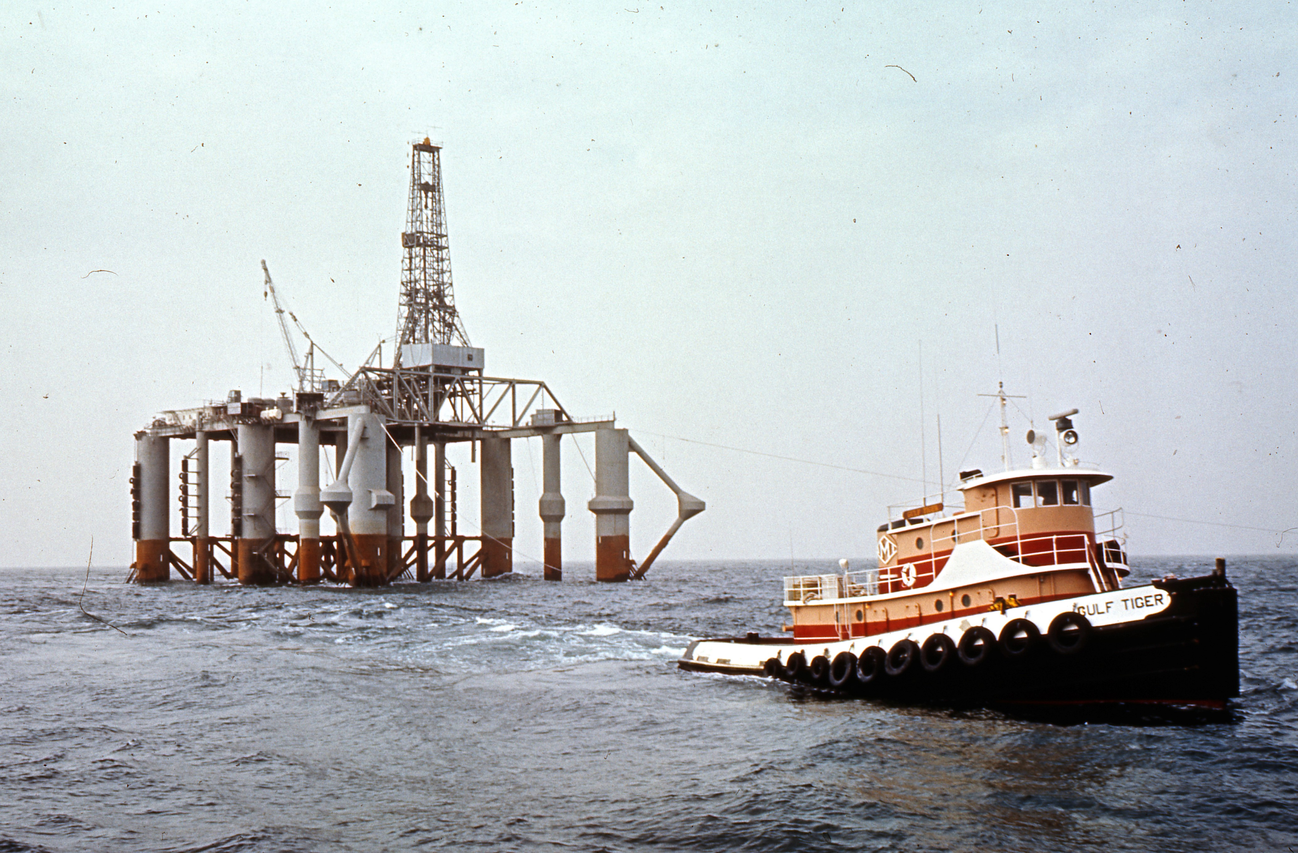 Bildet er hentet fra Arkivverket. Under slep. Original tekst: "Under tow". Arkivinstitusjon : Statsarkivet i Stavanger Arkivnavn : Pa 1512 - Esso Exploration and Production Norway Inc. Sted : Norge, , , Emneord: Olje, Oljeplattform, Petroleum Avbildet